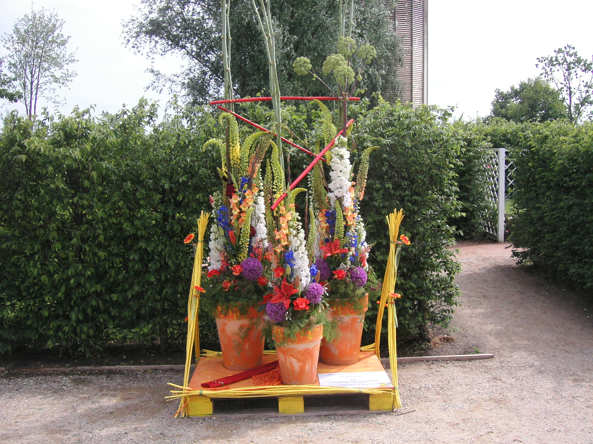 Dekoration Florales Objekt